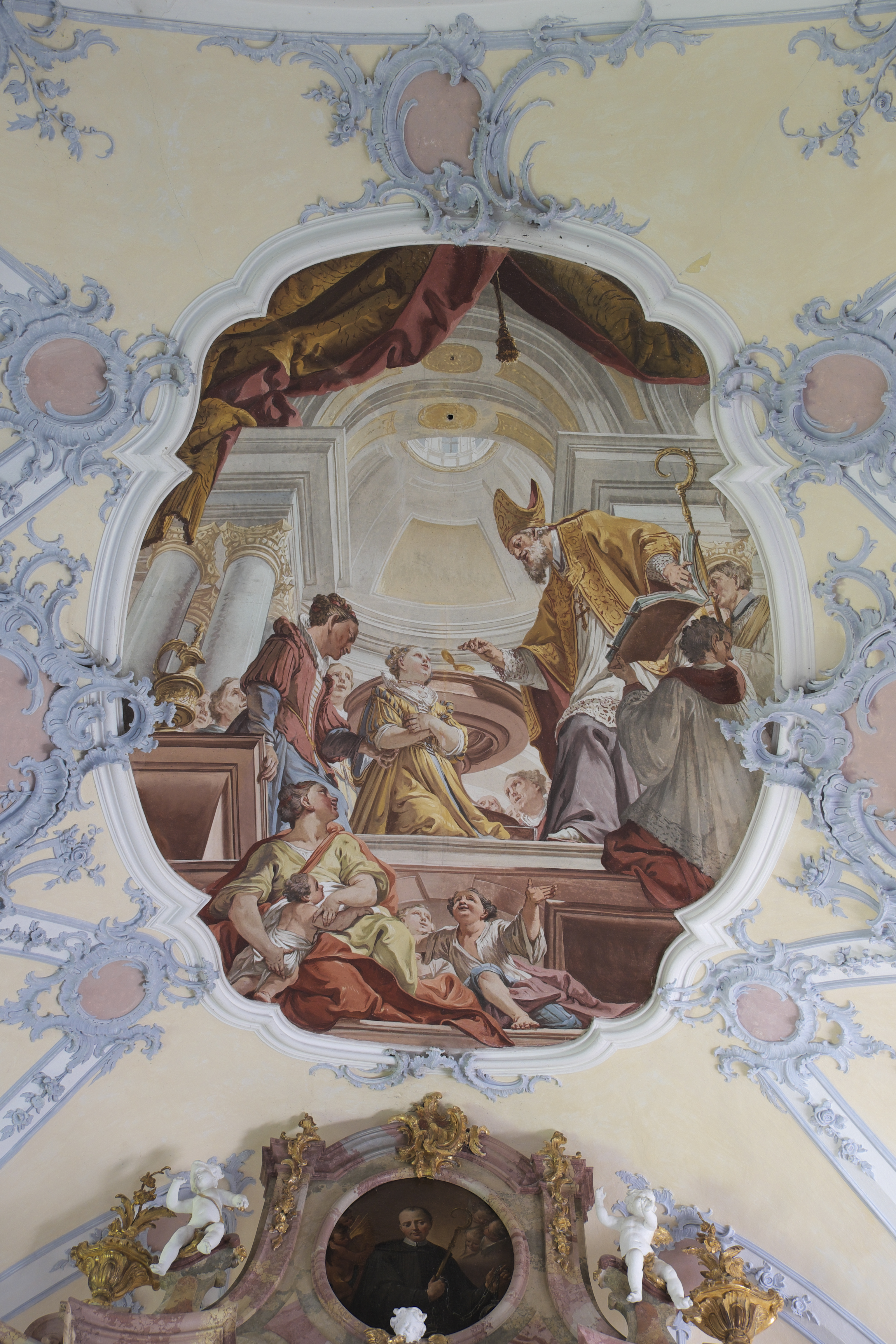 Katholische Kapelle Sankt Ottilia in Rott im Landkreis Landsberg am Lech (Bayern/Deutschland), Deckenmalerei im Chor; Darstellung: Taufe (Chrisamsalbung) der heiligen Ottilia durch Bischof Erhard von Regensburg, Matthäus Günther zugeschrieben